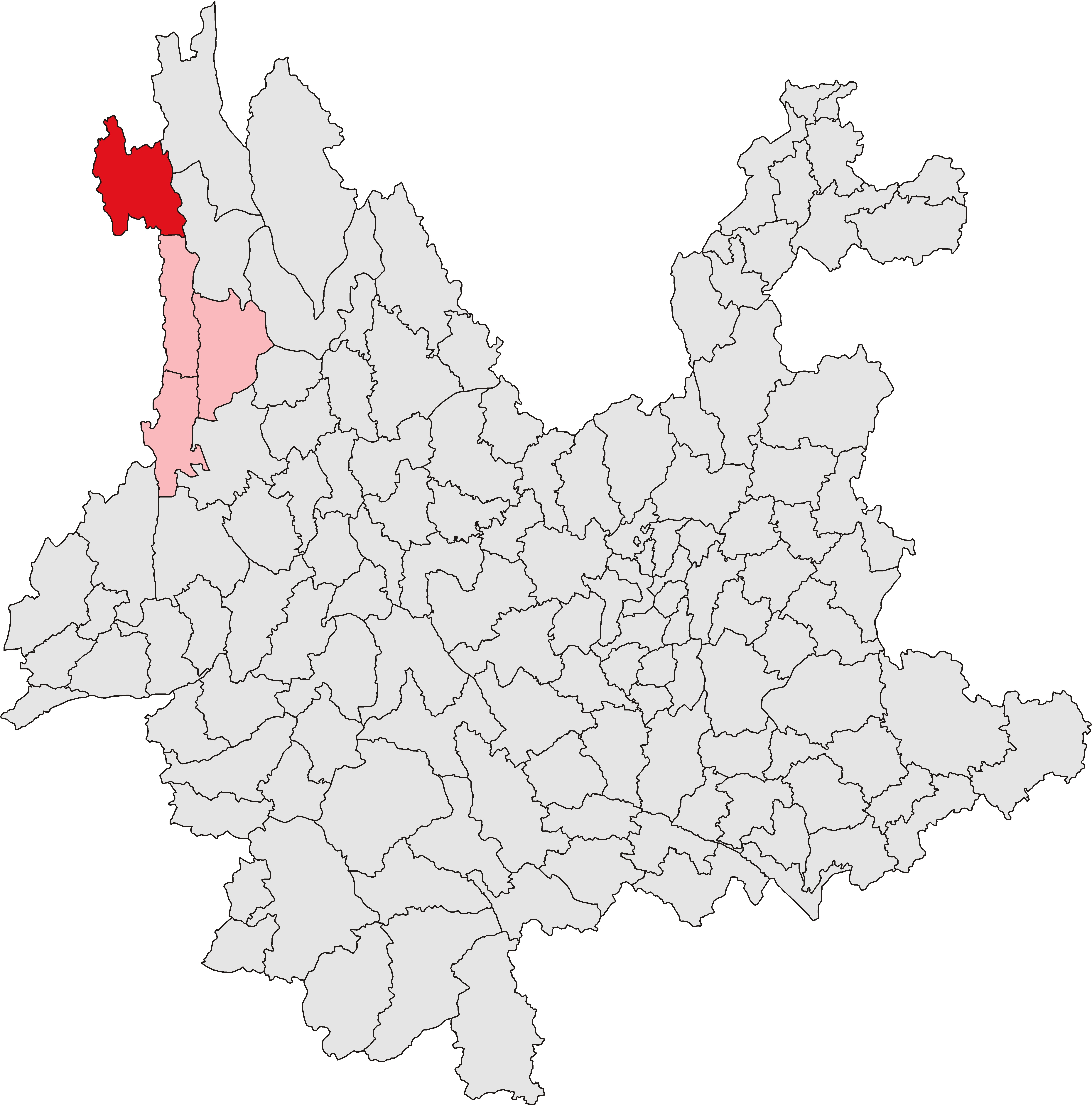 贡山独龙族怒族自治县位置图